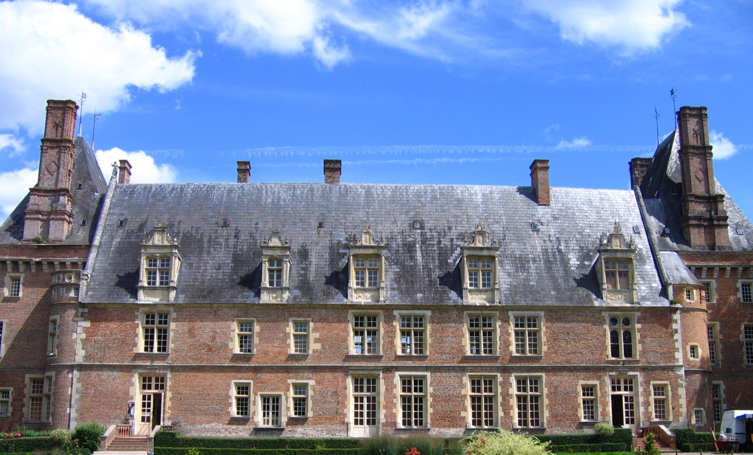 Château de Saint-Amand-en-Puisaye (Nièvre)